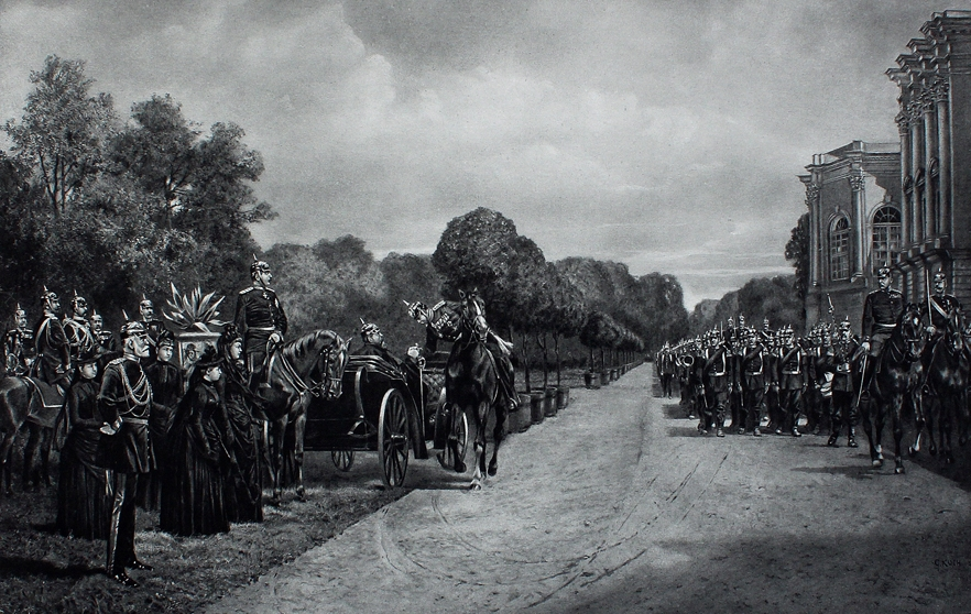 Vorführung der 2. Gardeinfanteriebrigarde durch den damaligen Kronprinzen Wilhelm (Kaiser Wilhelm ll.) im Park des Charlottenburger Schlosses am 29. Mai 1888. v.l.n.r. Oberst von Schmeling, Flügeladjutant von Bissing, Flügeladjutant von Pfuel, Oberst von Petersdorf, Prinzessin Margarethe, Prinzessin Sophie, Generaladjutant von Winterfeld, Prinzessin Viktoria, Kronprinzessin Augusta Viktoria (Kaiserin Augusta Viktoria), Kronprinz Wilhelm (Kaiser Wilhelm ll), Kaiser Friedrich lll, Oberst von Wilczeck, Oberstleutnant von Böcklin